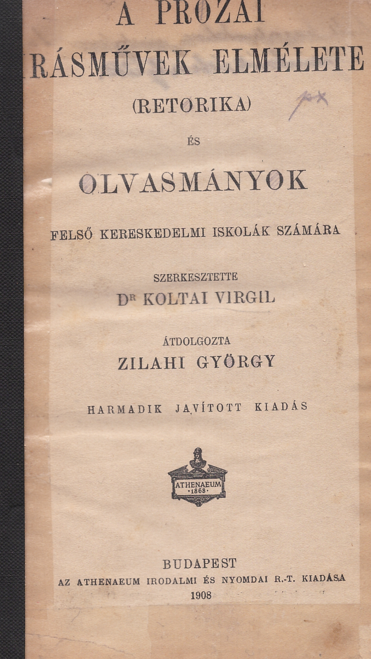 Koltai Virgil (1857-1907): A prózai írásművek elmélete (saját készítésű kép)